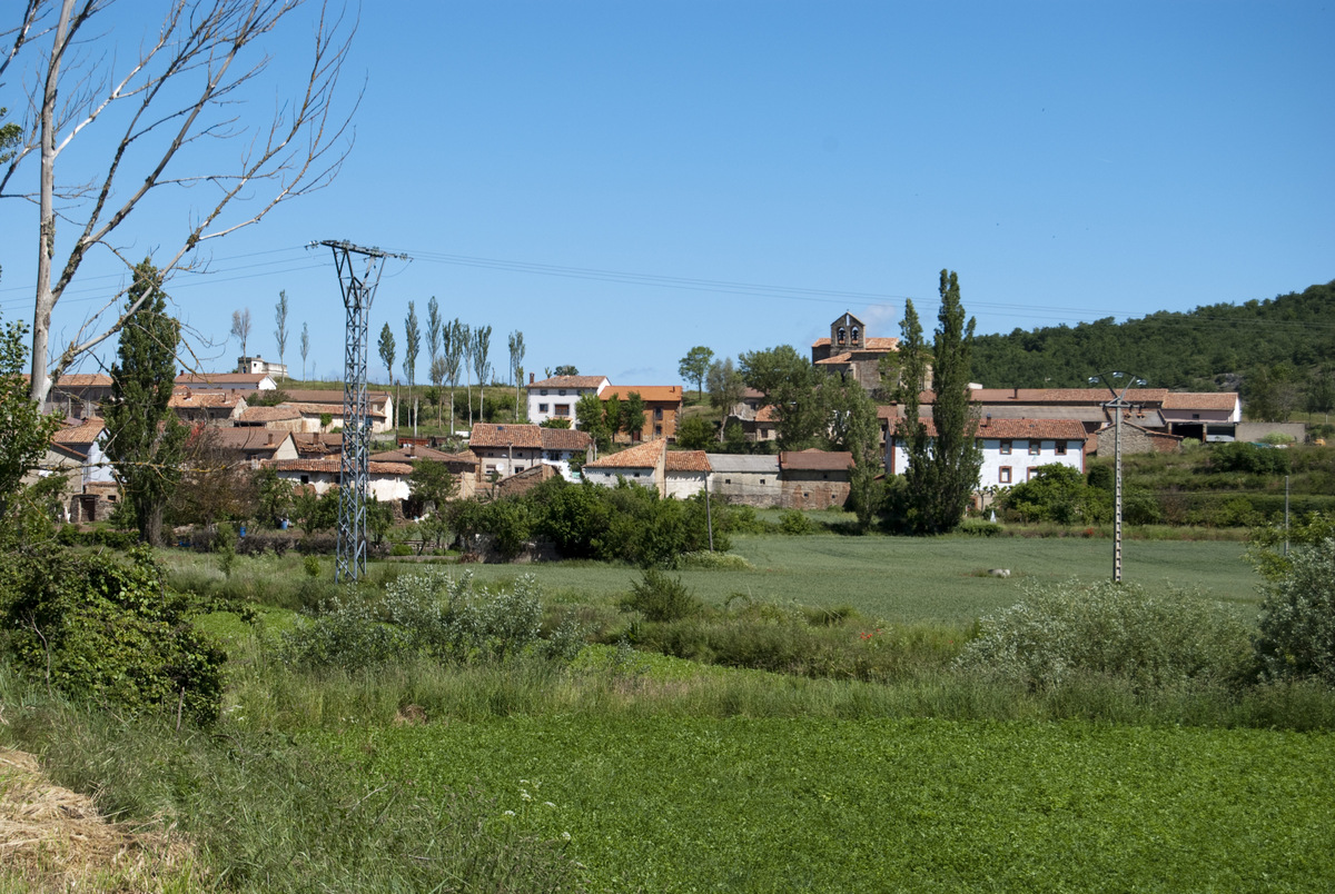 Lomilla. Palencia. España.